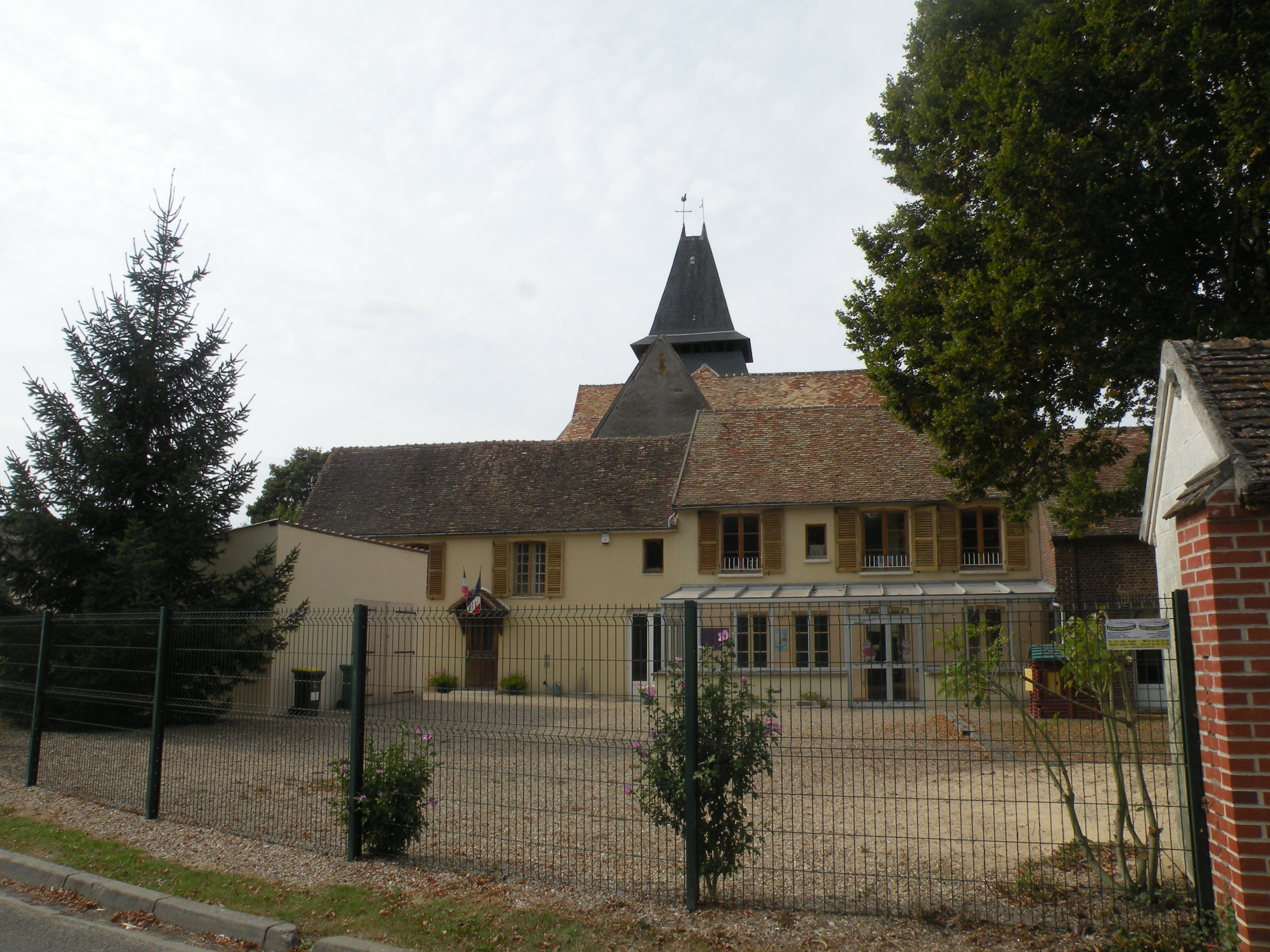 mairie Énencourt-Léage